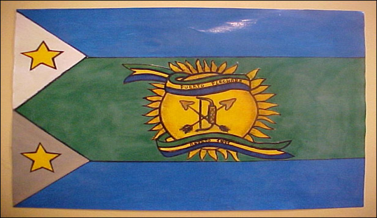 Bandera del municipio Silva, estado Falcón.